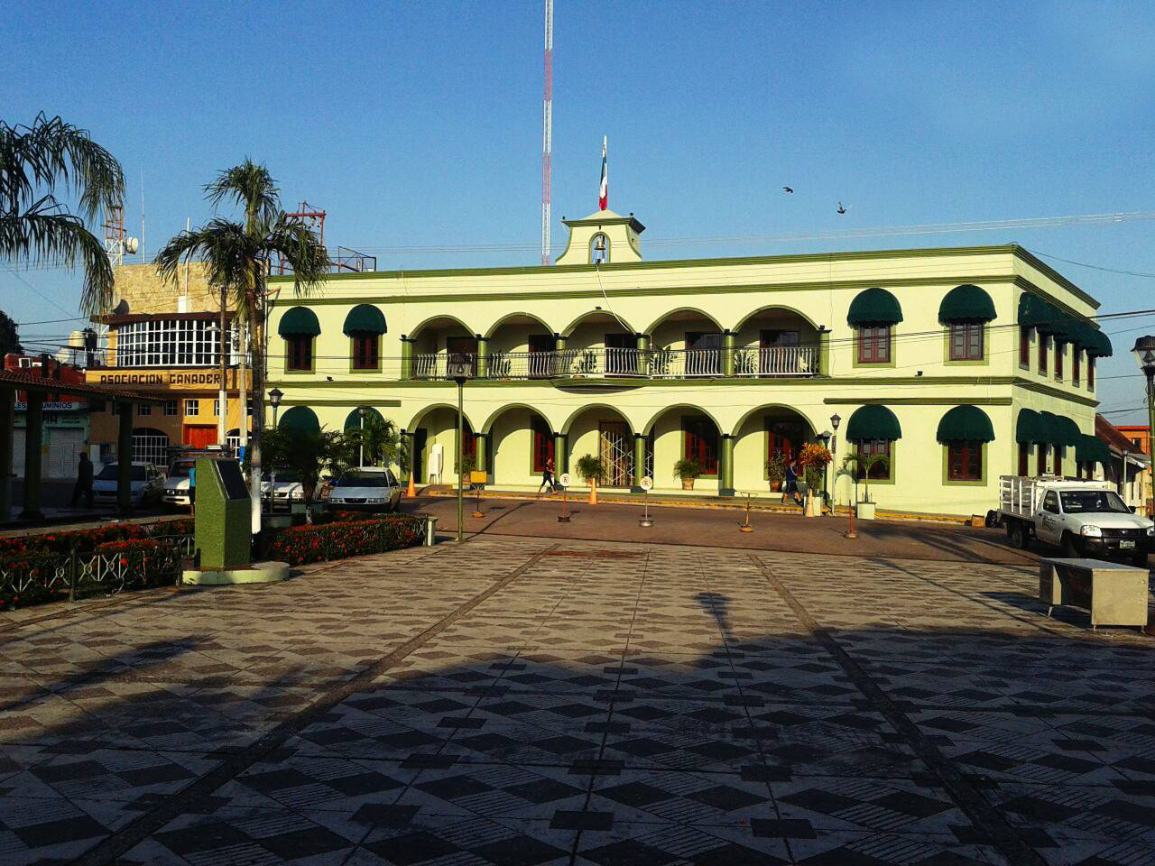 Palacio Municipal